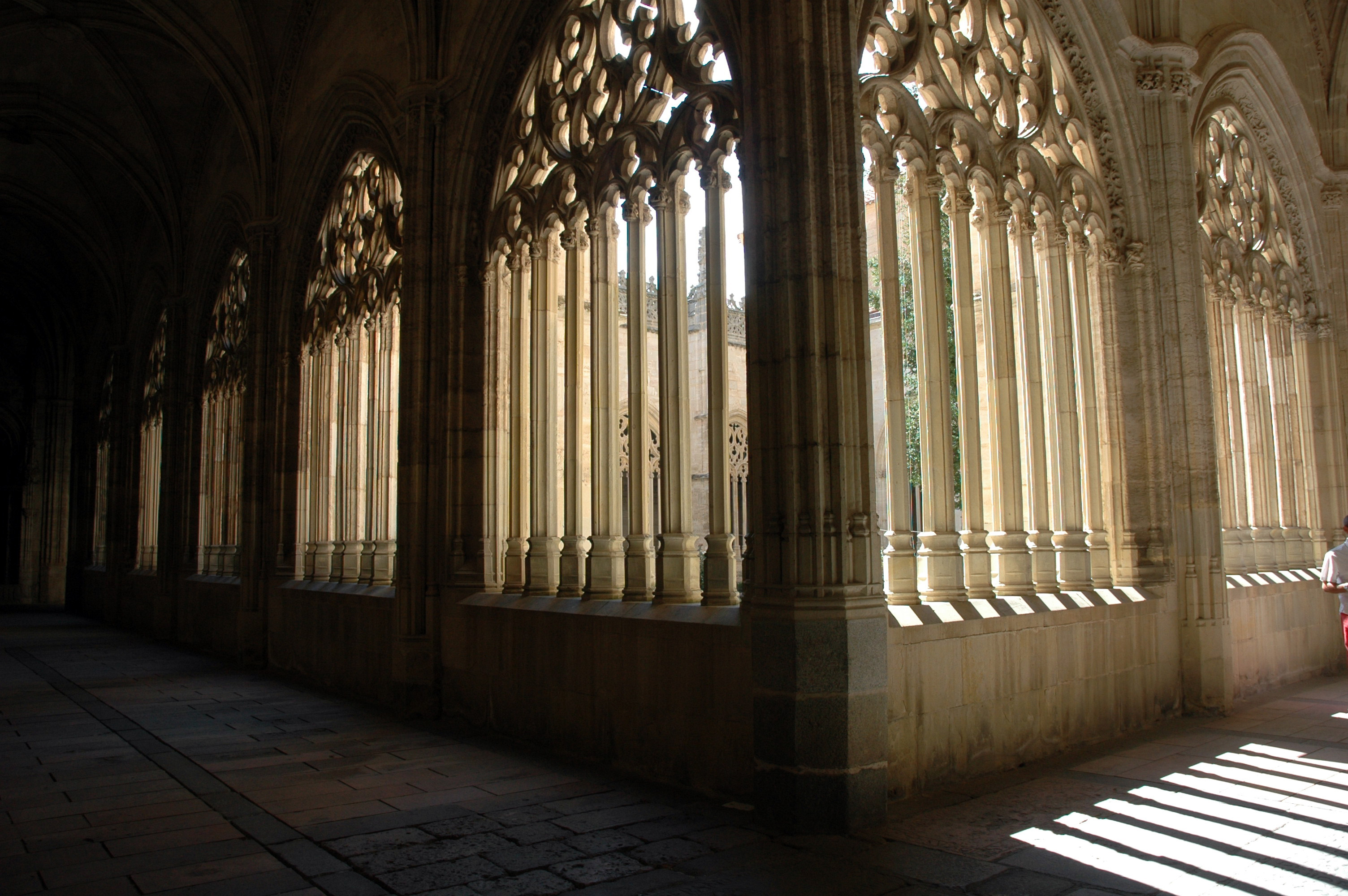 Claustro - Catedral de Segovia, España.